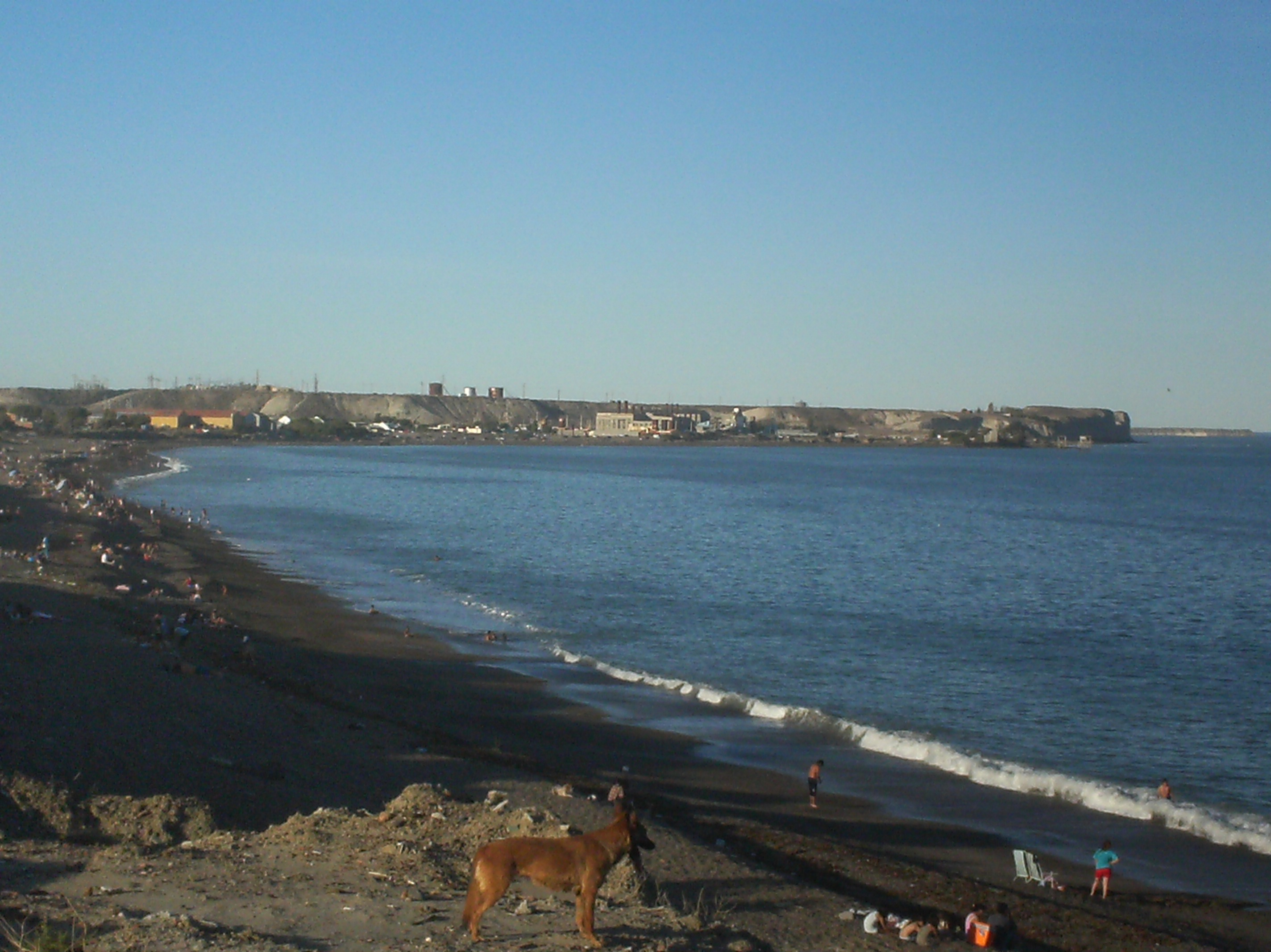 PARTE COSTERA DEL BARRIO KM 5